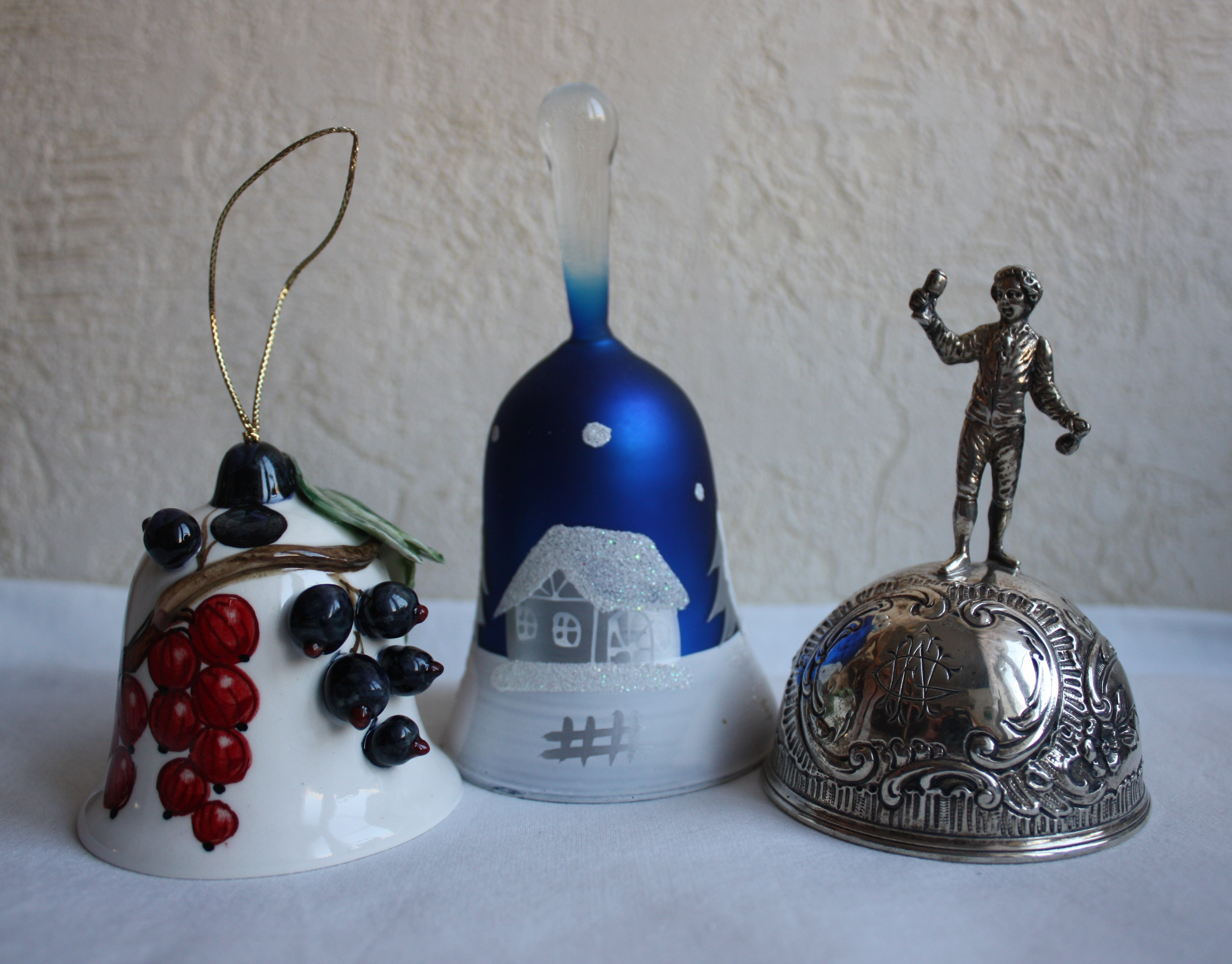 Слева направо: колокольчик без ручки, колокольчик с обычной ручкой, колокольчик с ручкой в виде фигурки человека